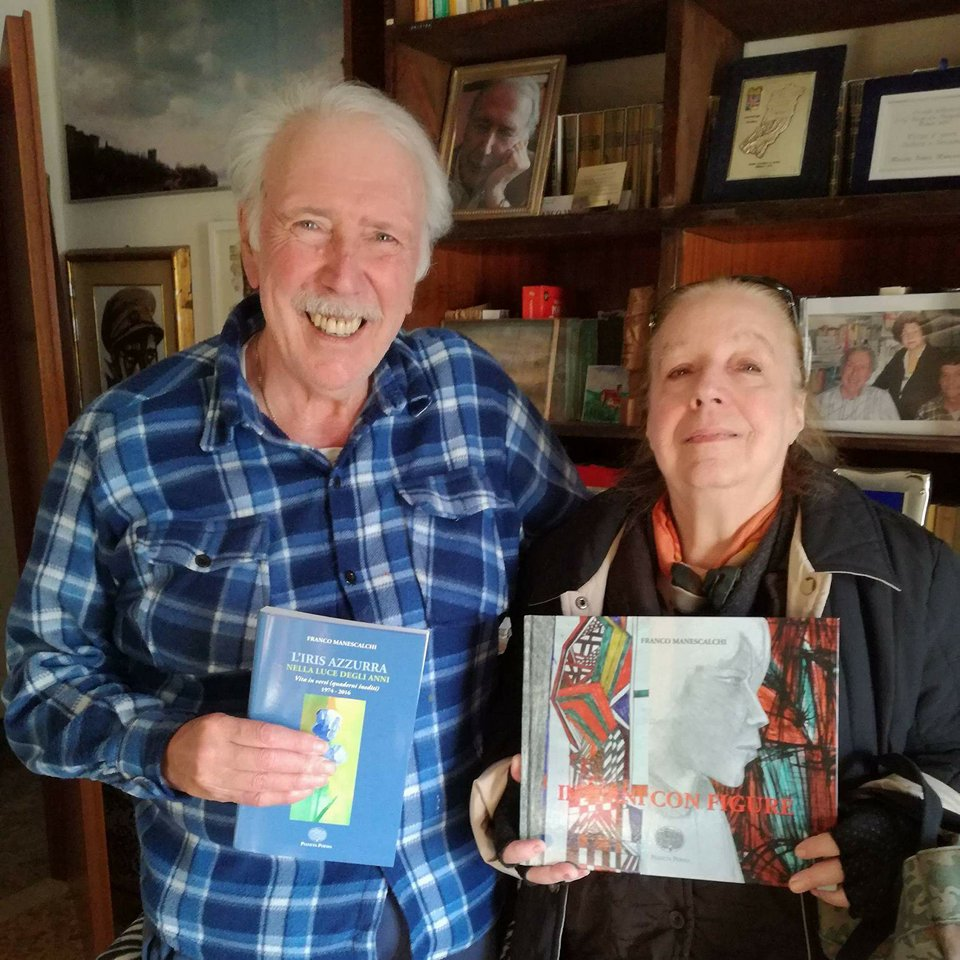 2017 gli ottantanni di Franco Manescalchi incontro nel suo studio di Firenze